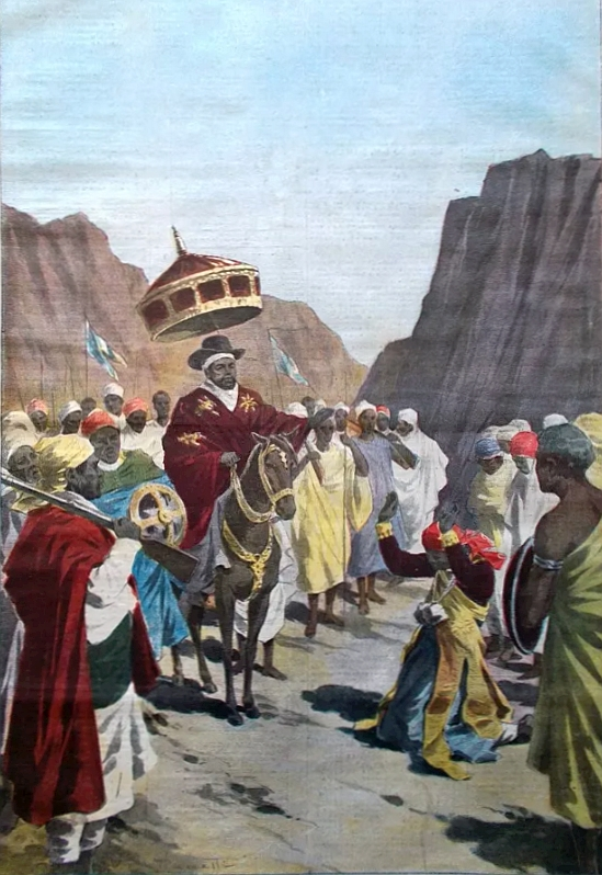 Al campo di Borumieda (1899) Ras Mangascià con la pietra al collo, fa atto di sottomissione al Negus Menelik